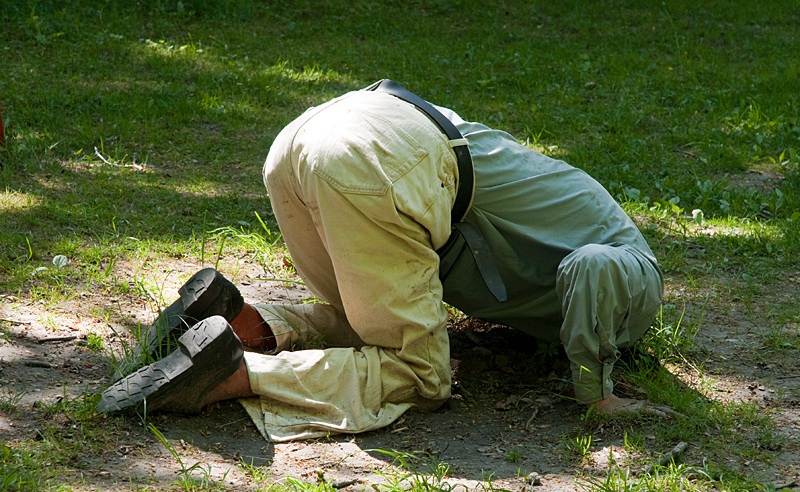 Verk i Skulpturparken Stjärnholm i Oxelösund